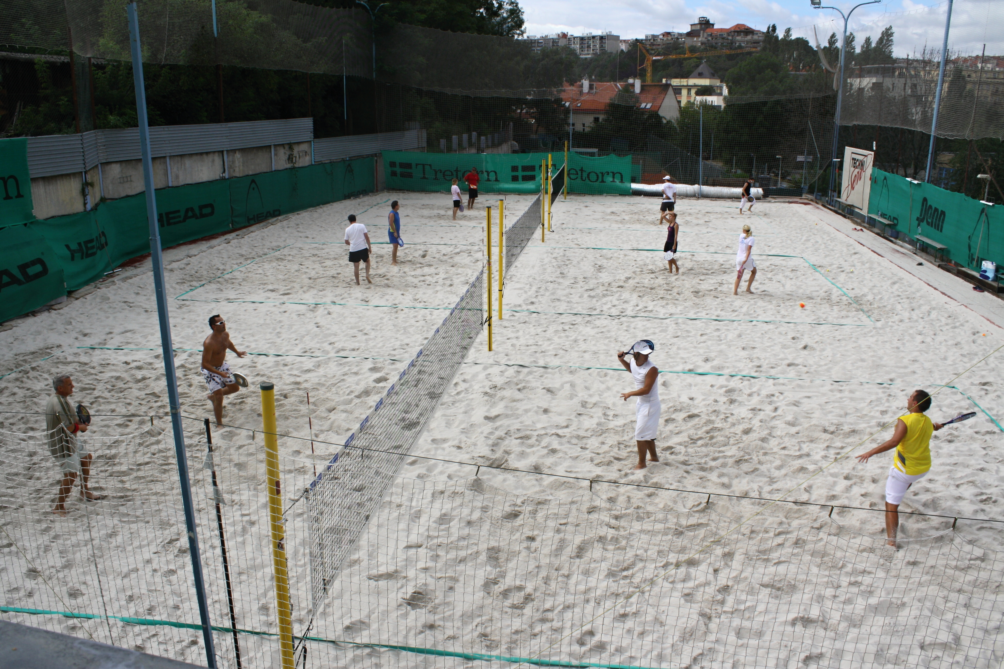 beachtenis na Kapitolu